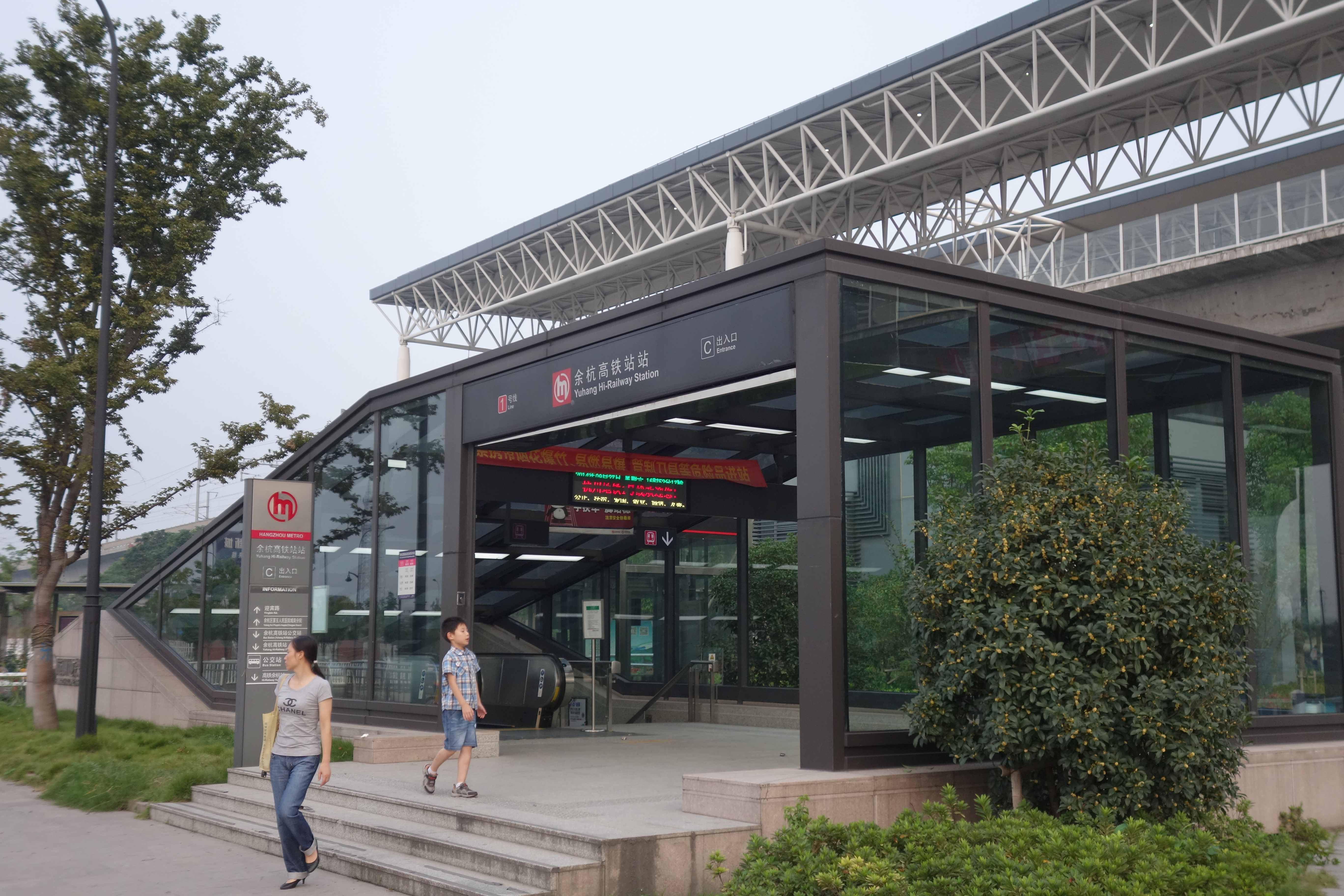 杭州地铁余杭高铁站